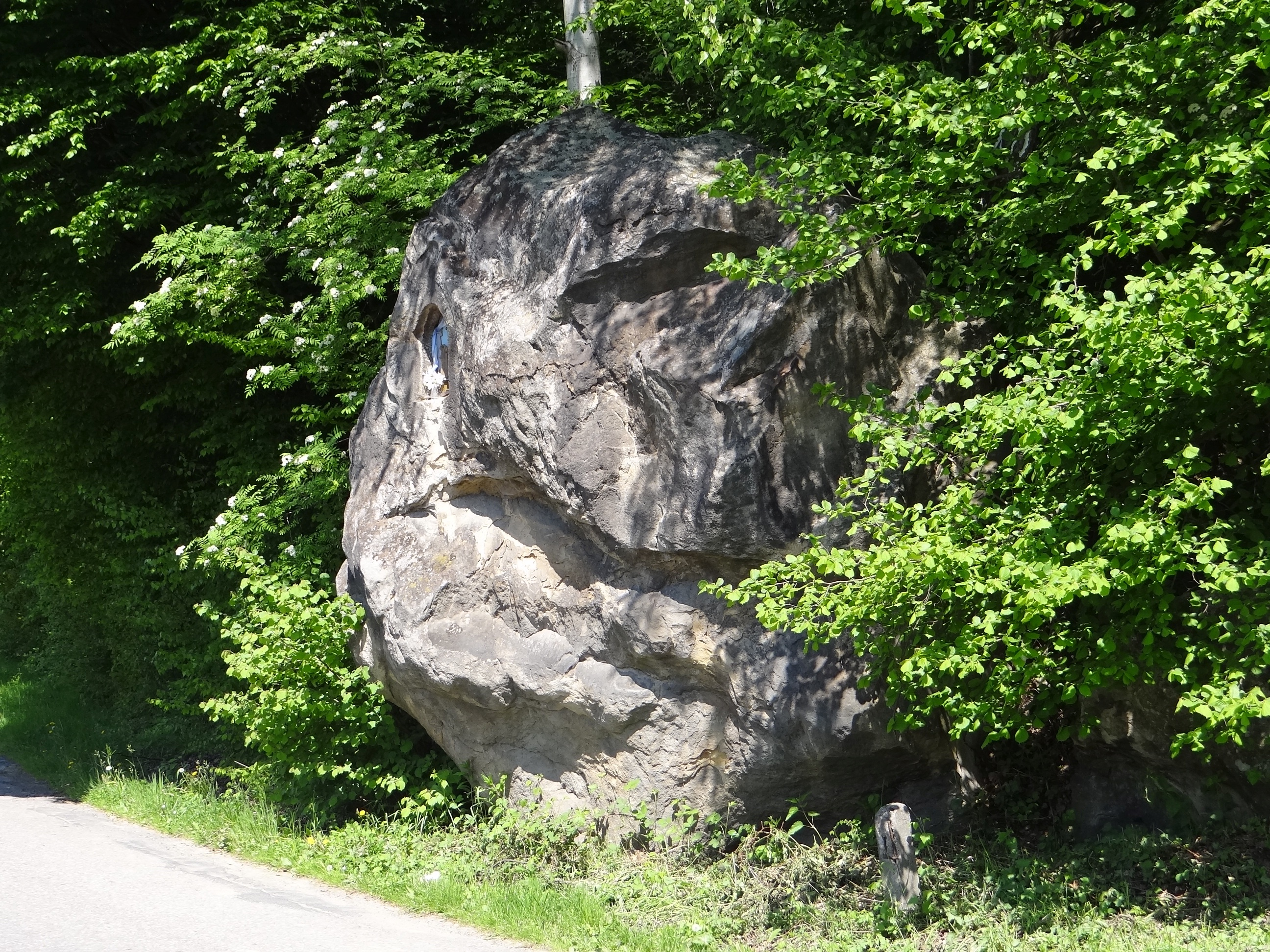 Kamieniołom w Ostruszy